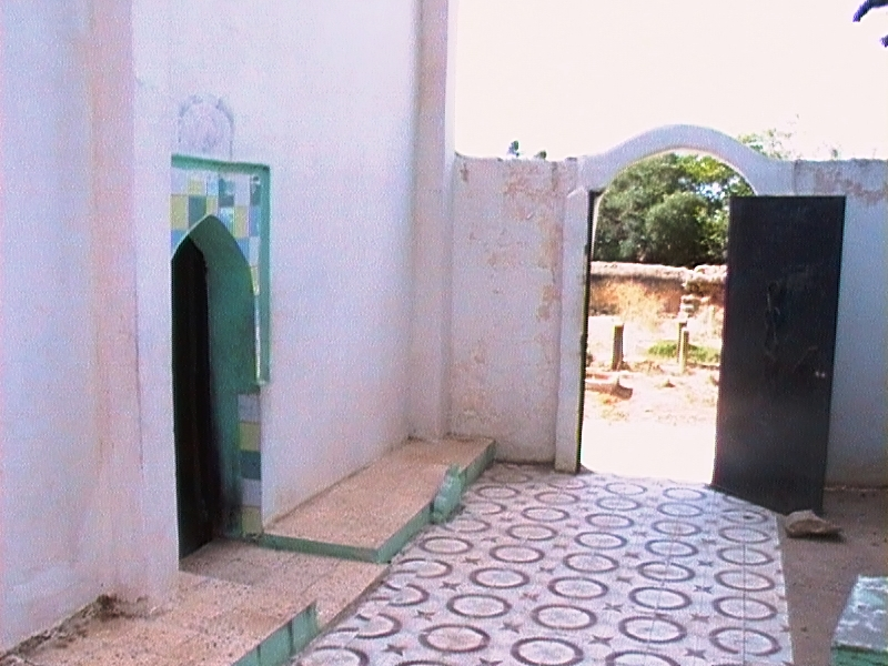 Made by Samsung DVC